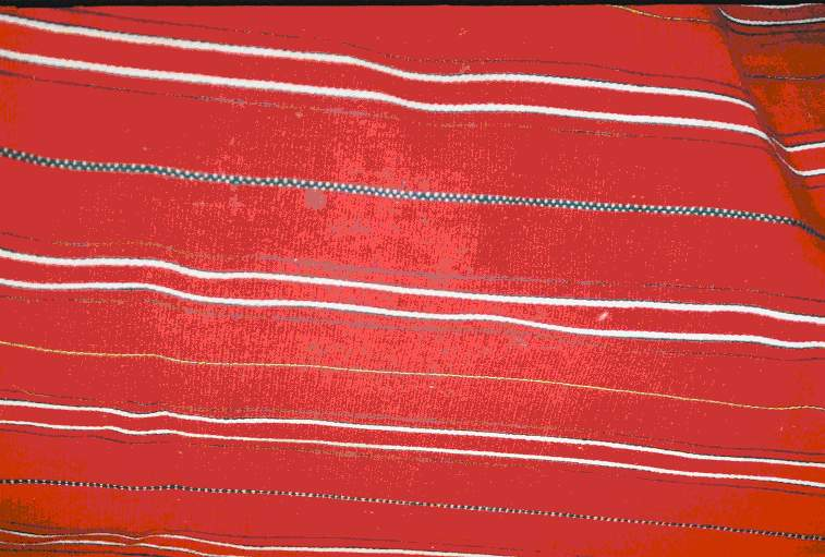 Rusinski vez